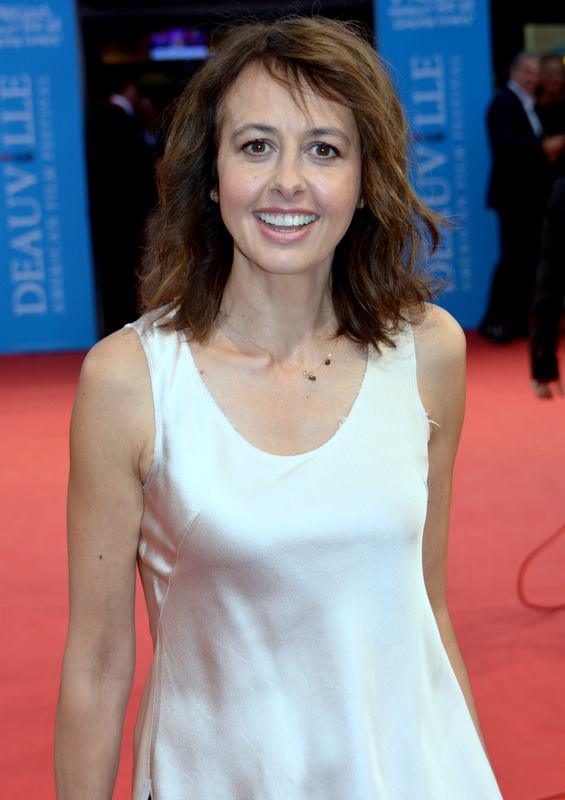 Valérie Bonneton au festival de Deauville